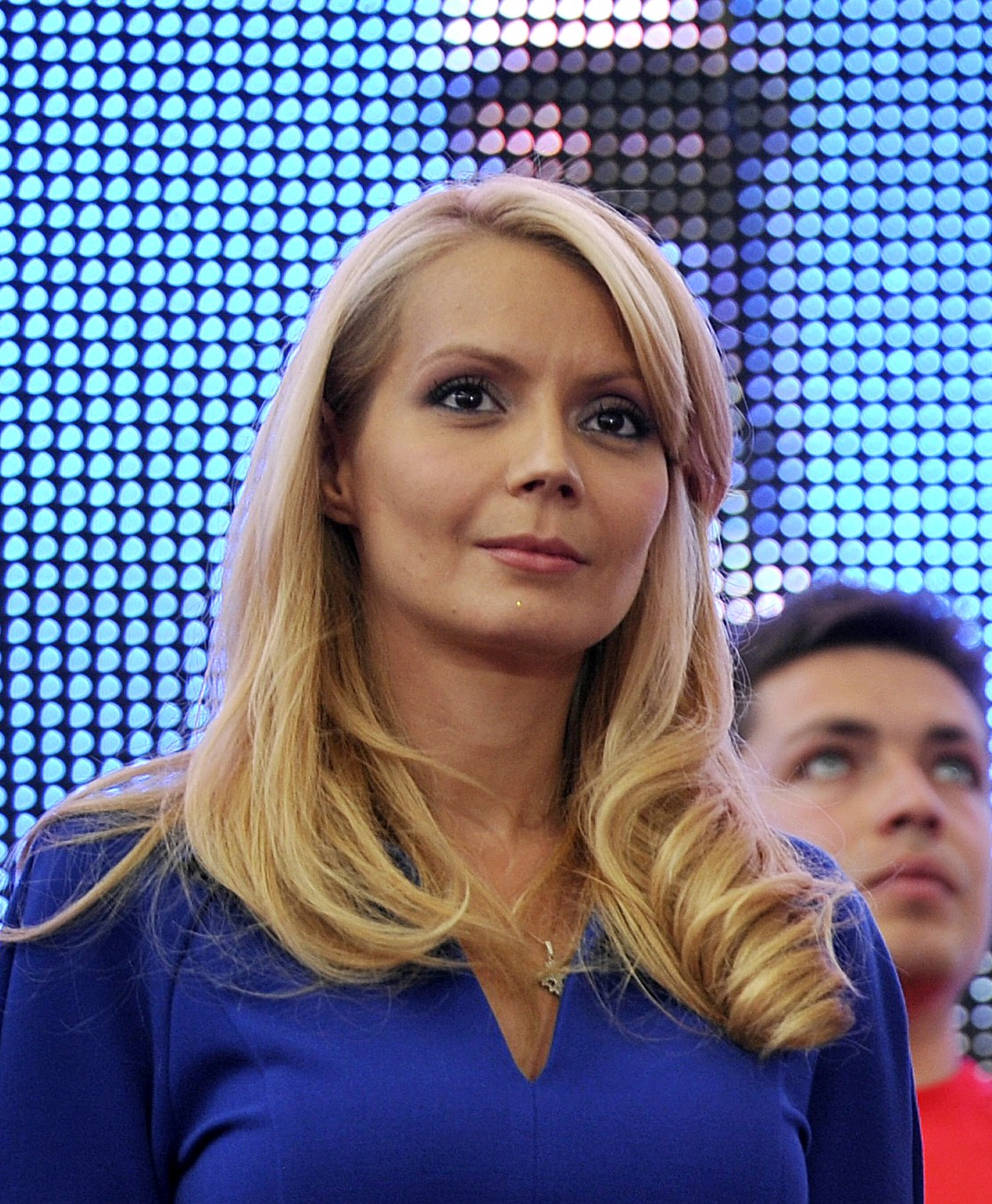 Lansarea candidaturii lui Victor Ponta la alegerile prezidentiale din 2014 - 20.09 (10)